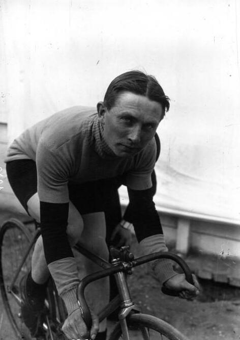 Cycliste : Thuau